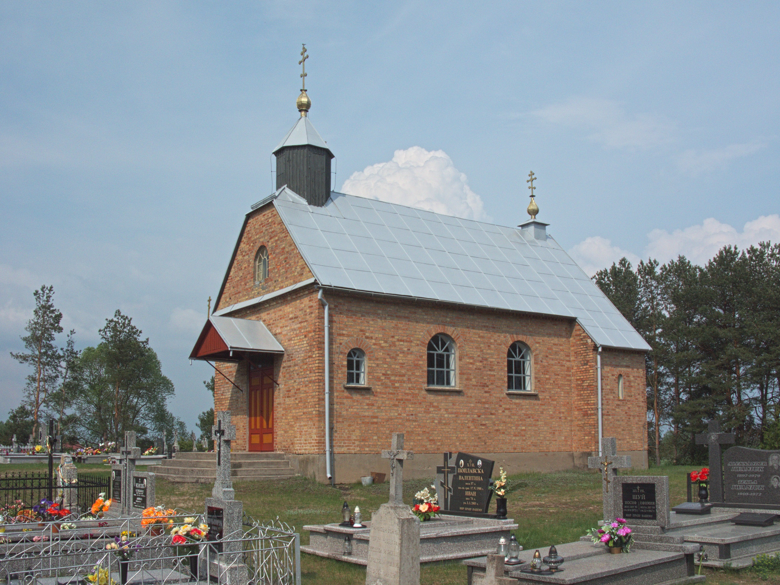 Prawosławan kaplica cmentarna św. Łukasza Ewangelisty w Ploskach.